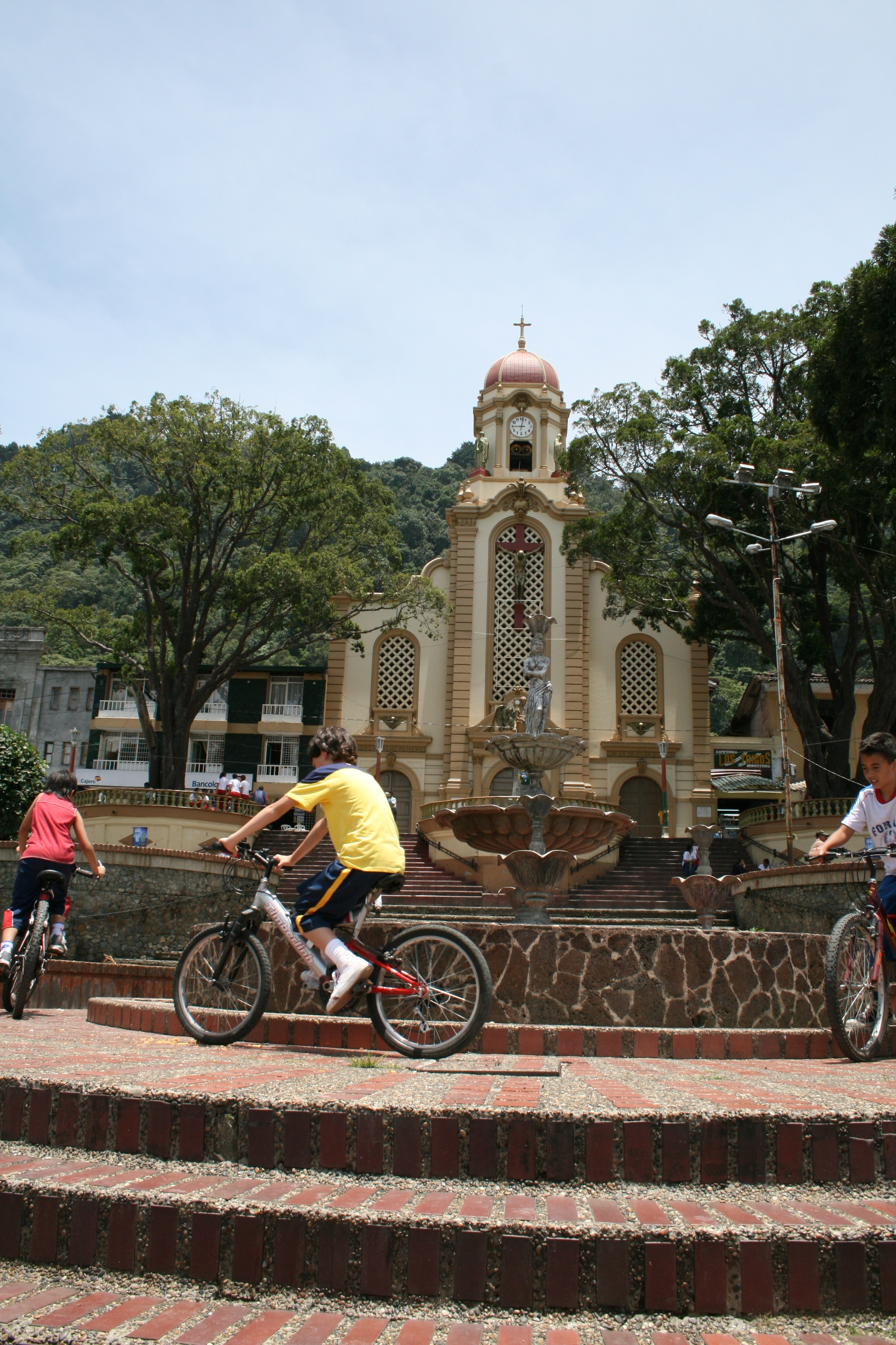 Vista general del parque y la iglesia principal de Fredonia, Antioquia.